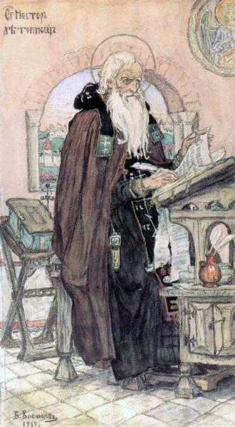 Нестор-летописец